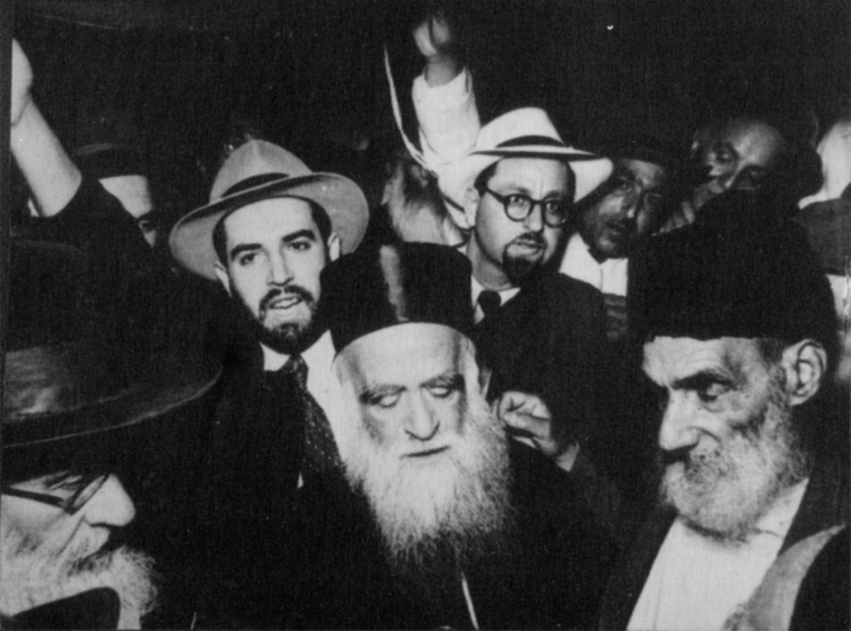 הרב צדקה חוצין (מימין), לצידו הרב שלום אזולאי, ומאחור (מוסתר) הרב אריה לוין.